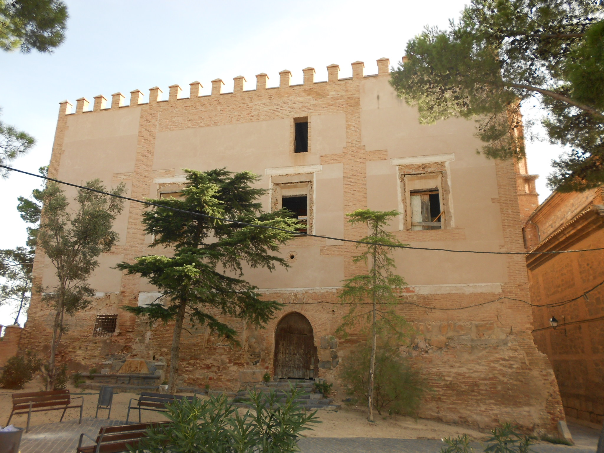 Castillo de Calatorao (Aragón, España)